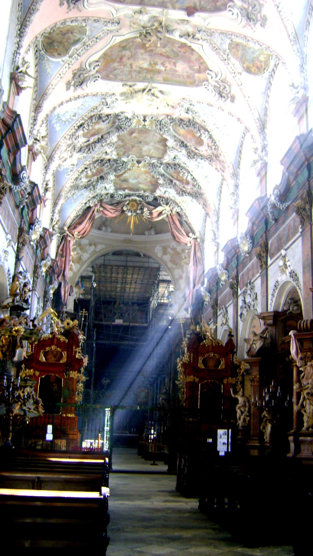 Lóď oseckého klášterního kostela.